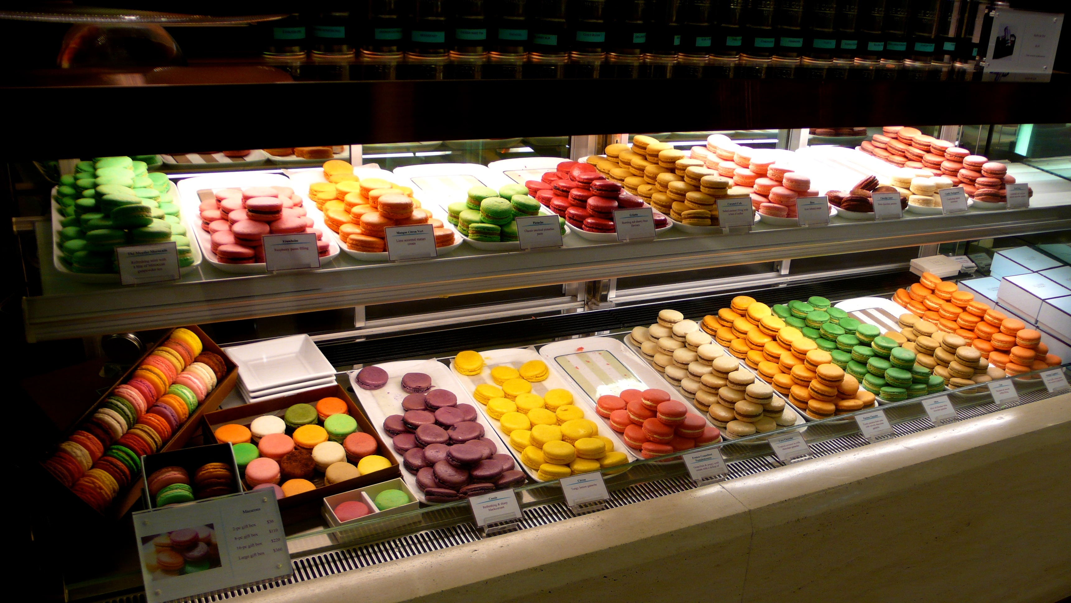 IFC LCB Macaron.